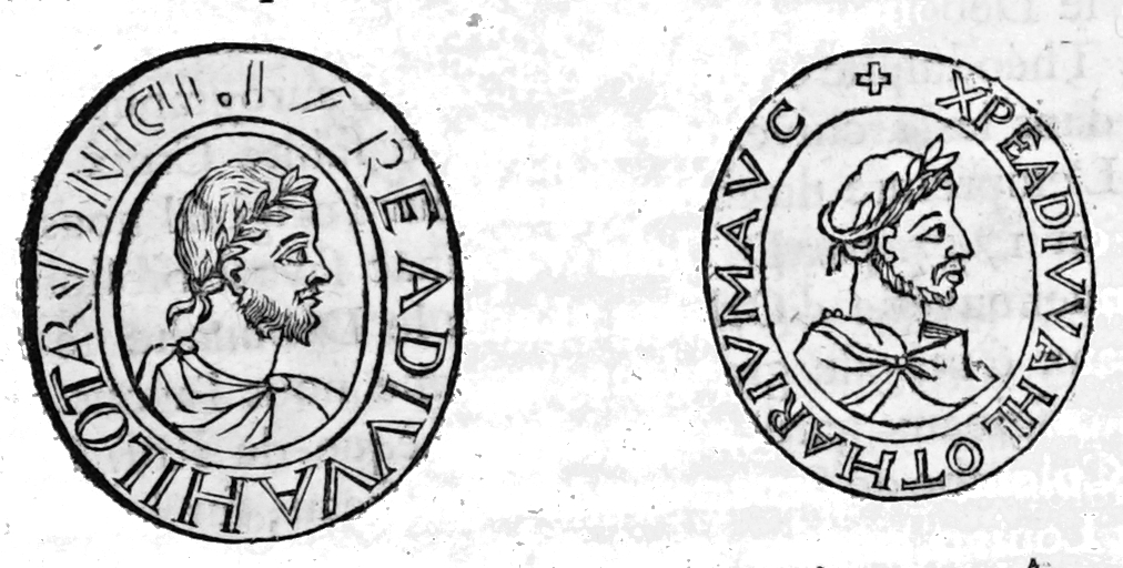 tiré de "nouveau traité de diplomatique...'.